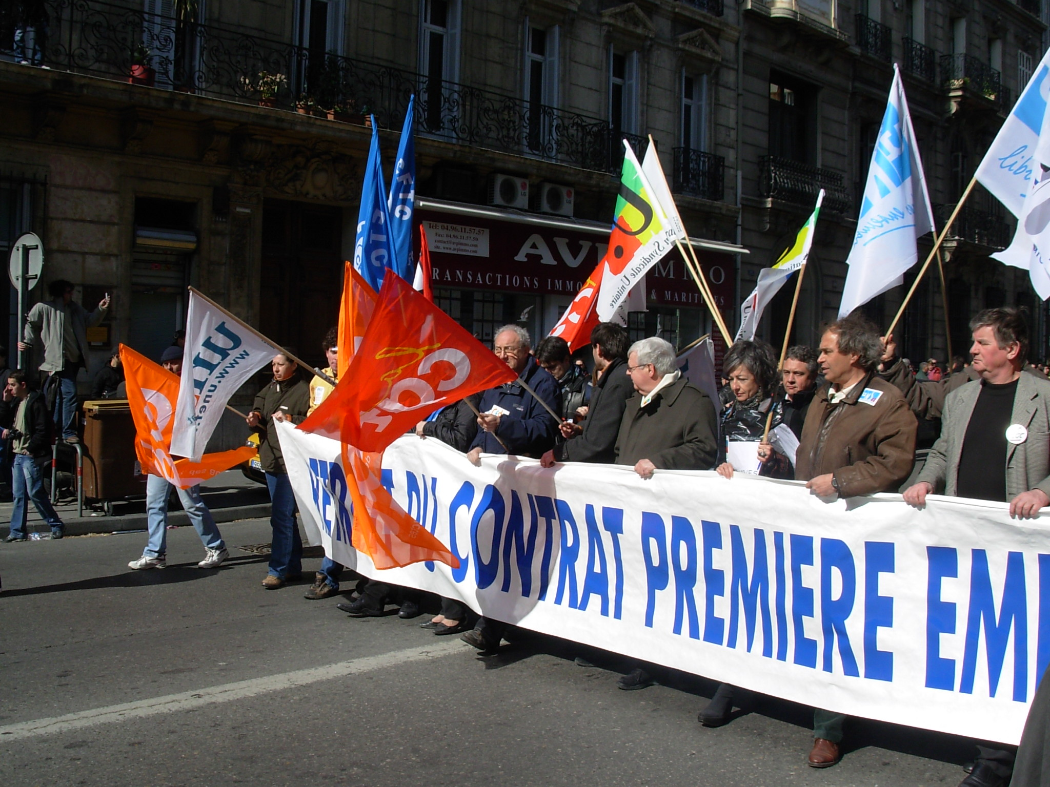 Cortège syndical lors d'une manifestation à Marseille